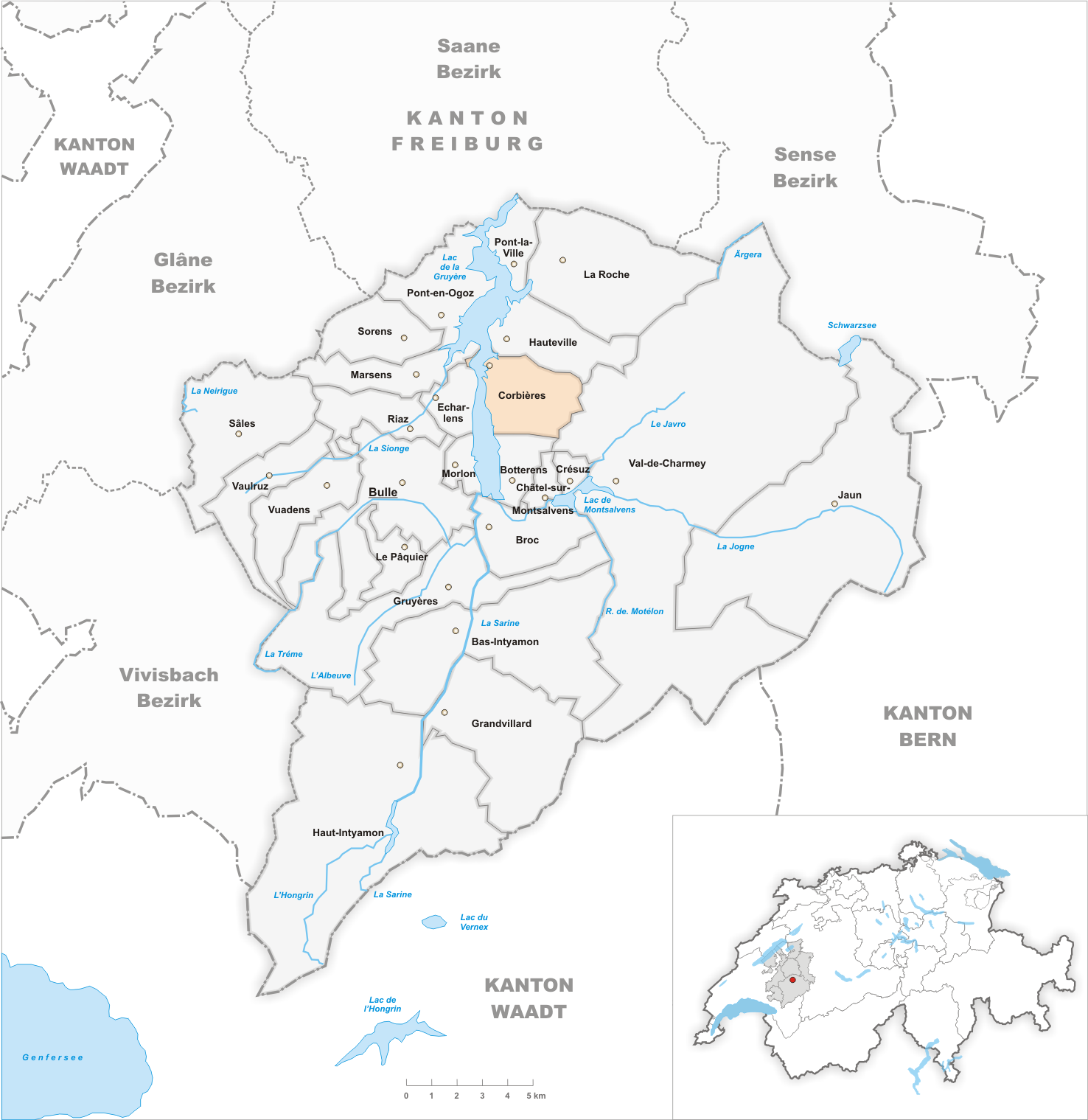 Municipality Corbières